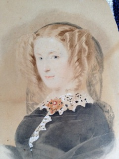 Антонина Сергеевна Кропоткина, ур. Щербатова (1818—1861)